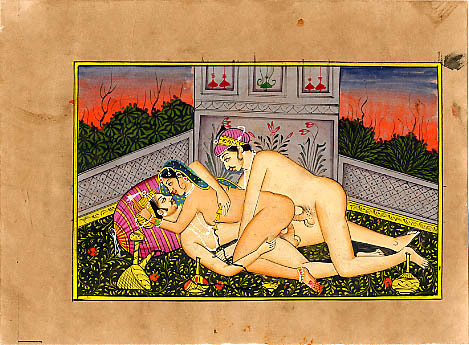 Kama Sutra Illustration